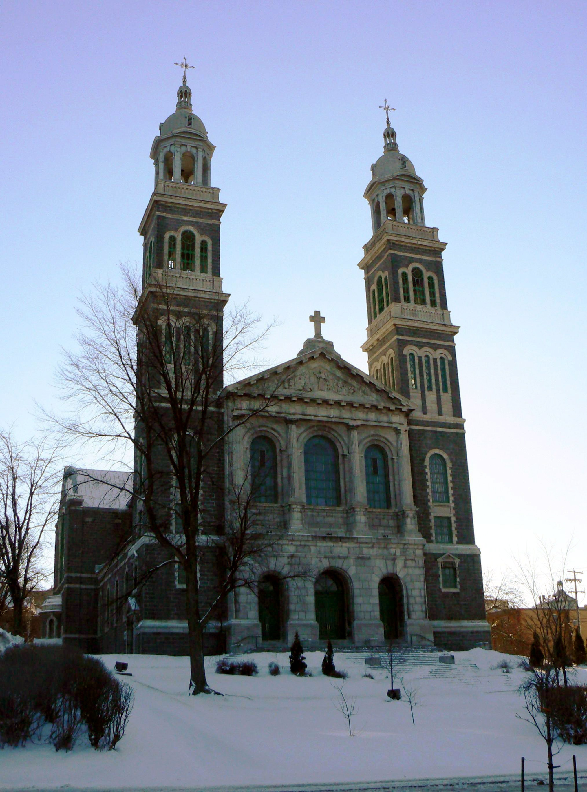 Cathédrale Saint-François-Xavier de Chicoutimi